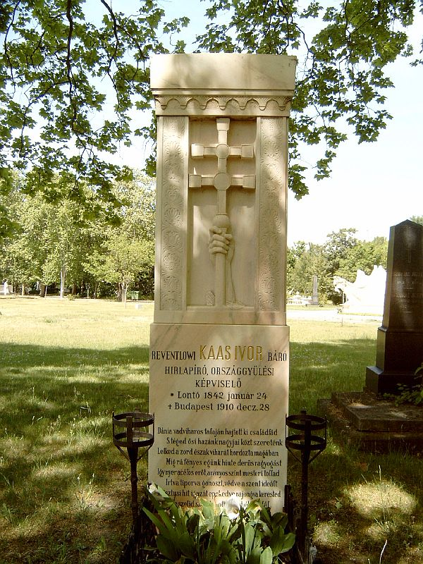 Kaas Ivor, báró (Lontó, 1842. jan. 24. – Bp., 1910. dec. 2.) publicista, politikus sírja Budapesten. Kerepesi temető: 28-díszsor-27.